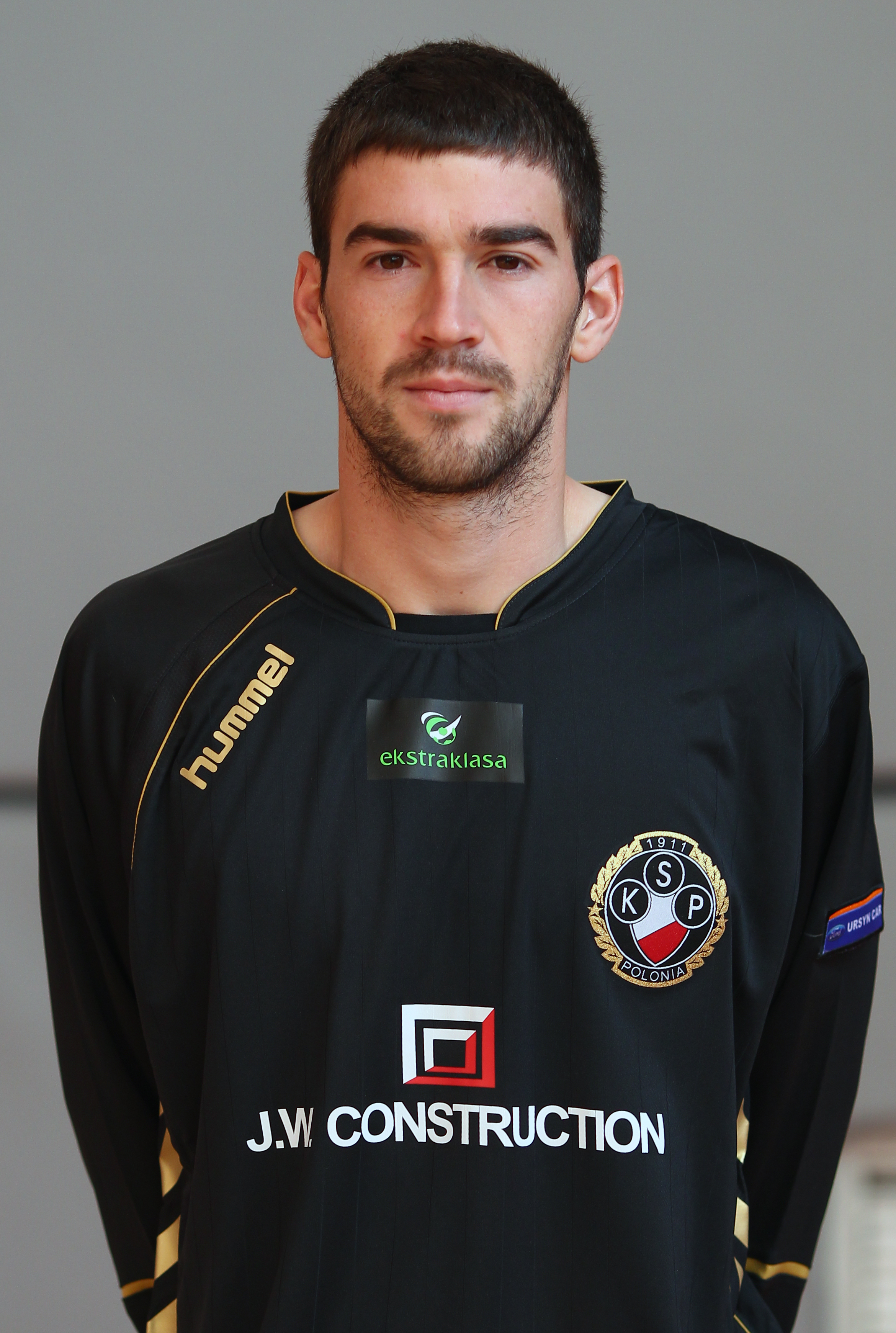 Miloš Adamović, player of Polonia Warszawa (2011)